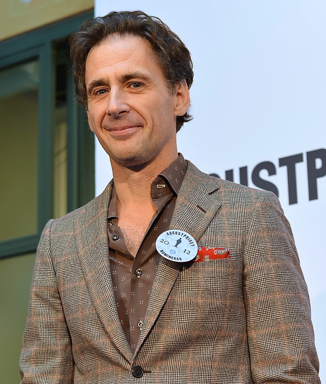 David Lagercrantz, Augustprisnominerad 2012 med boken "Jag är Zlatan Ibrahimović"